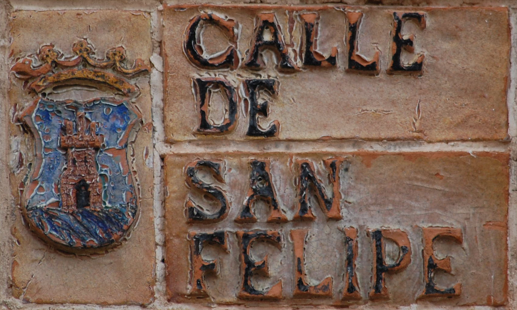 Cerámica artística de Carlos Chacón, indicativa de la calle San Felipe de Alcalá de Henares (Comunidad de Madrid - España).